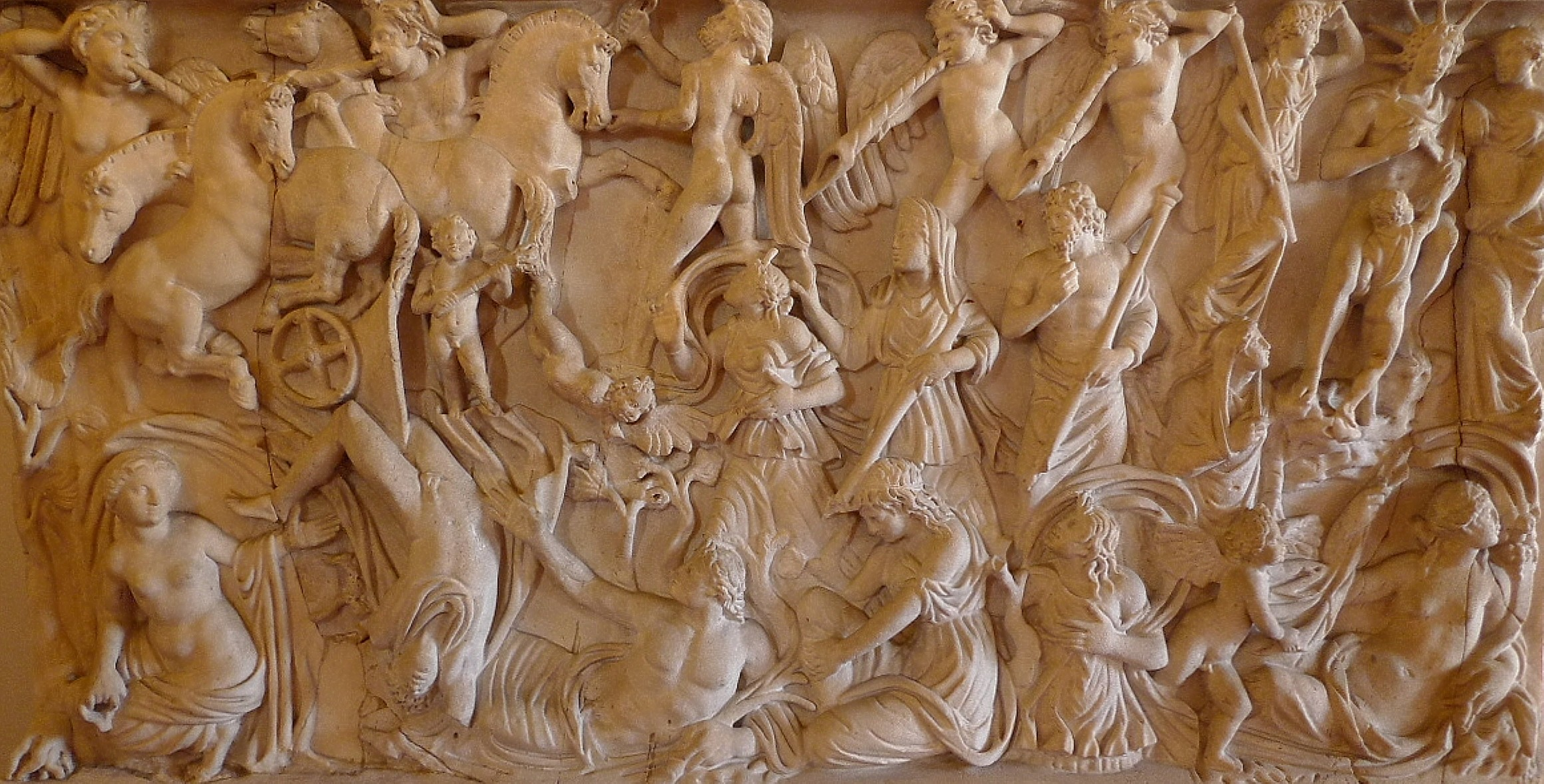 Museo Lapidario Maffeiano Verona: Römischer Sarkophag mit einem Relief, das die Geschichte von Phaeton zeigt (1. Jh. n. Chr.) - aus Rom